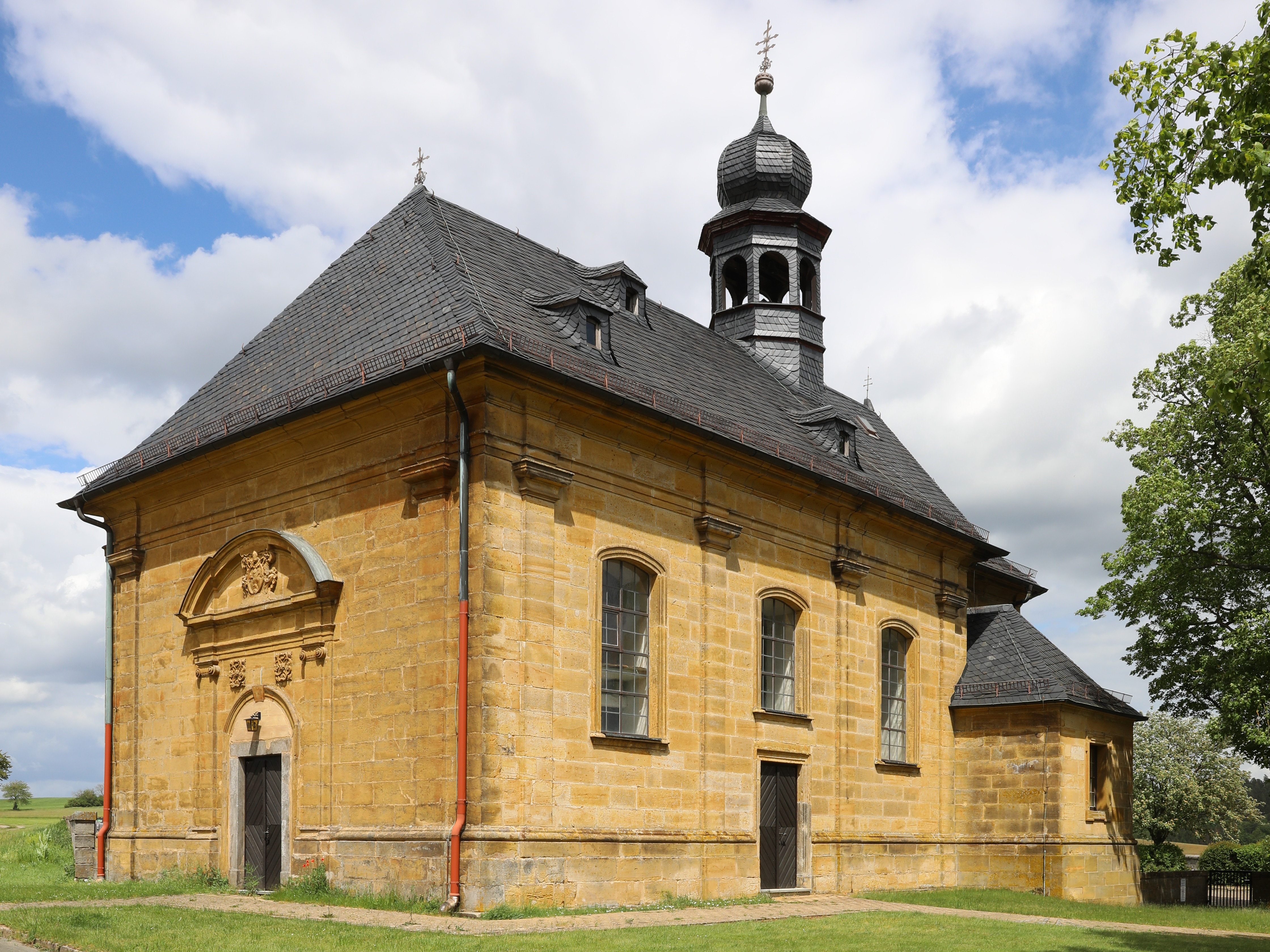 Kreuzkapelle in Isling, Stadteil Lichtenfels